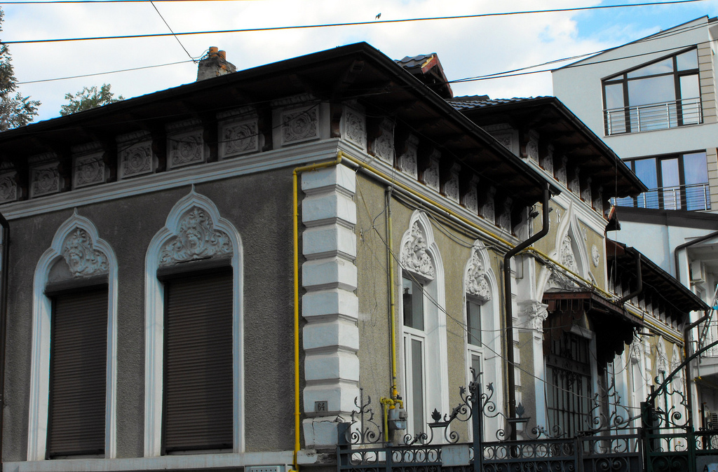 Icoanei 64